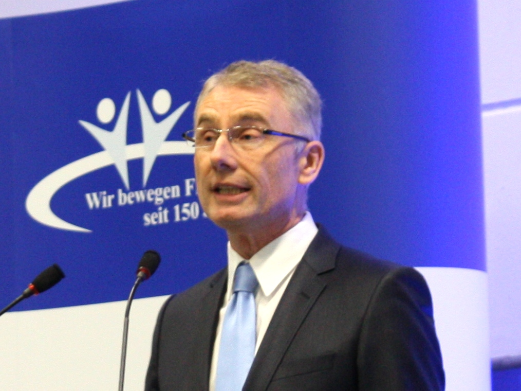 Michael Paris auf dem Neujahrsempfang der Turngemeinde Bornheim am 19. Januar 2013